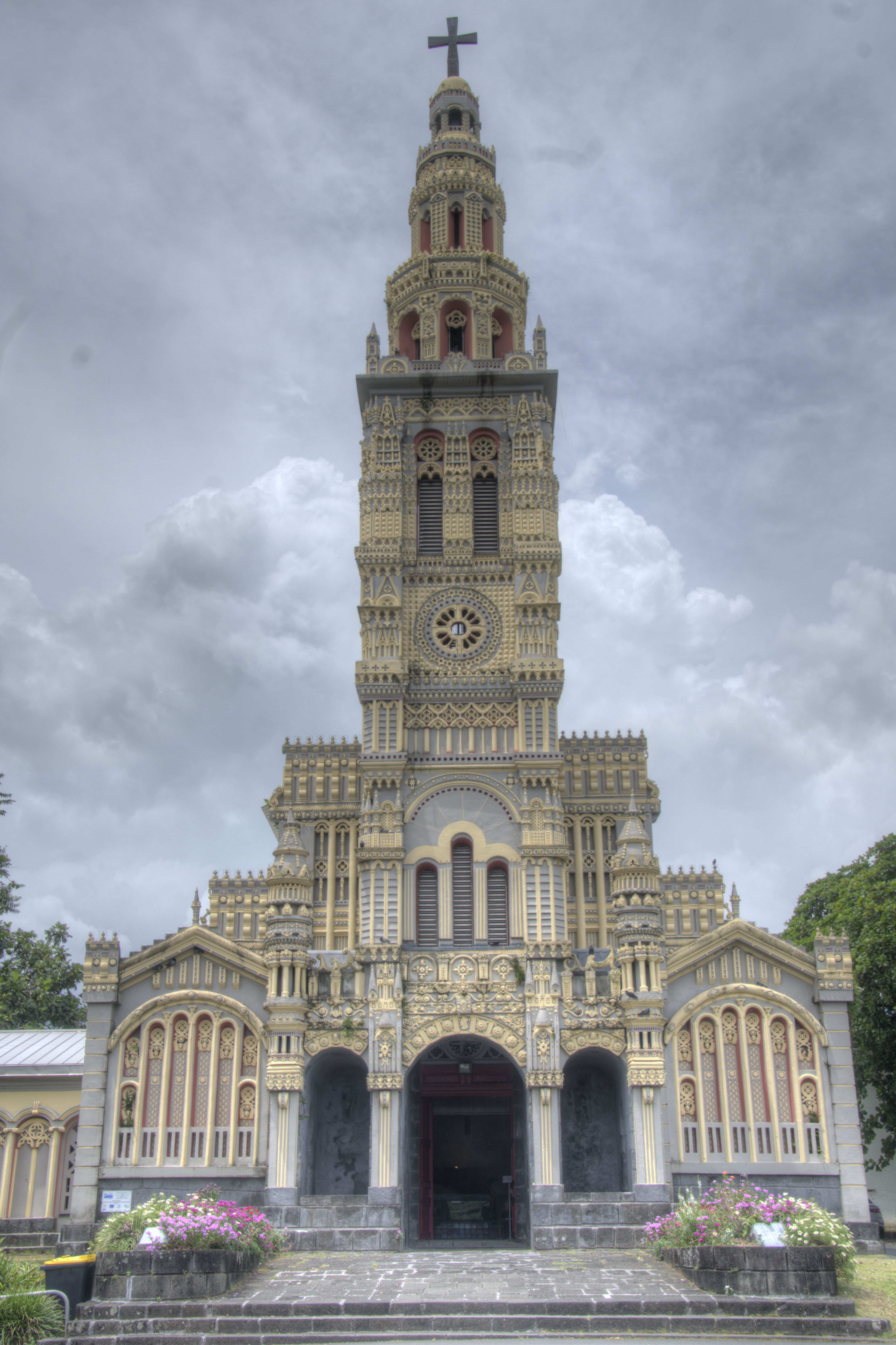 Façade de l'église Sainte-Anne, située sur la commune de Saint-Benoit à l'île de la Réunion